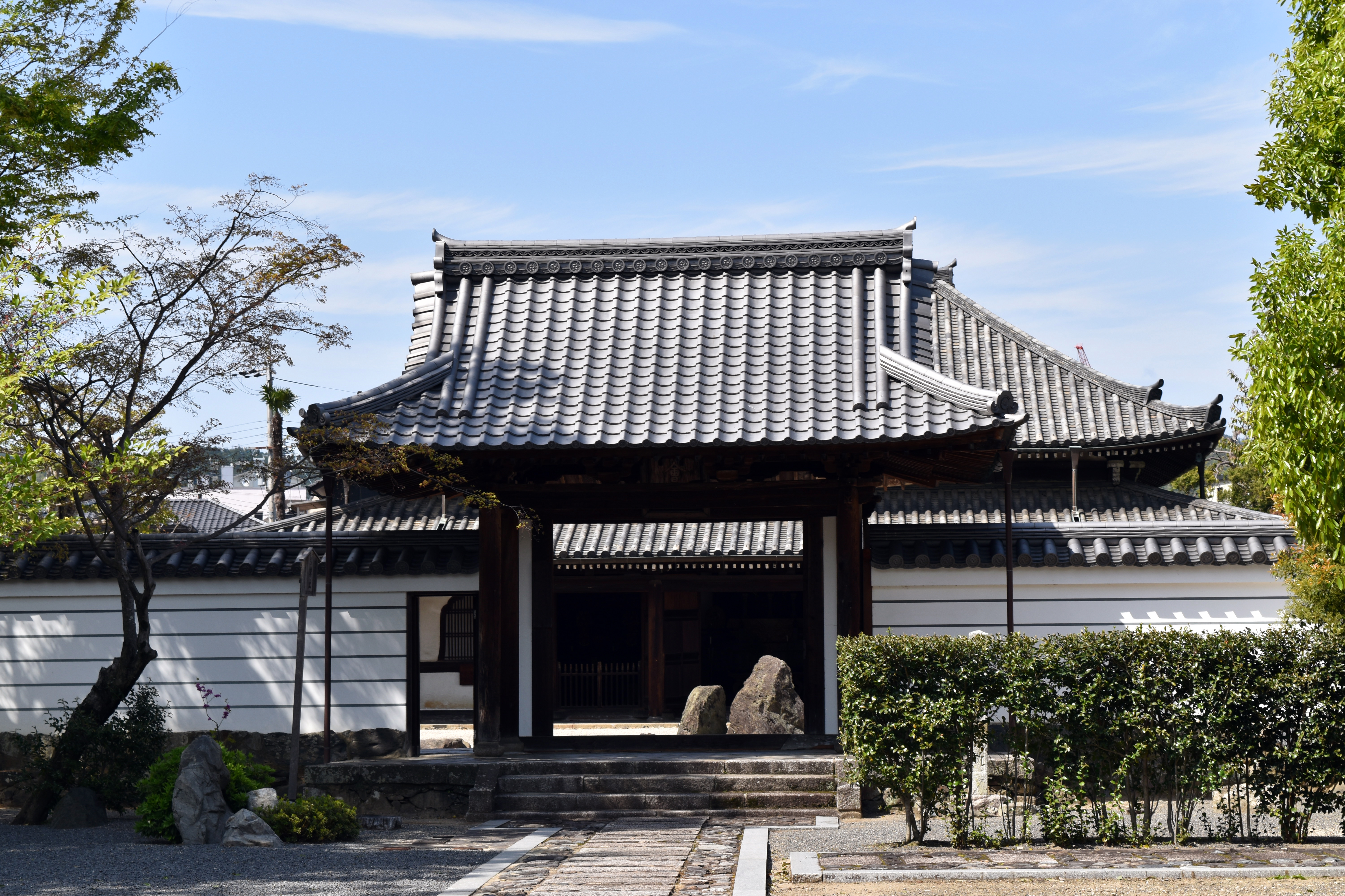 臨川寺中門